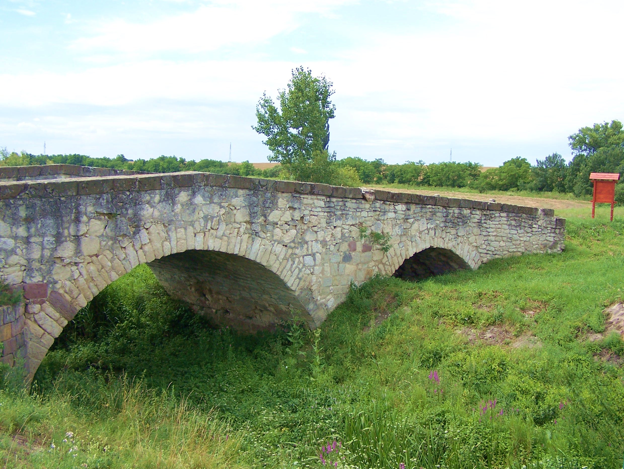 Kőhíd (Héhalom, Bér-patak fölött) This is a photo of a monument in Hungary, Identifier: 6600